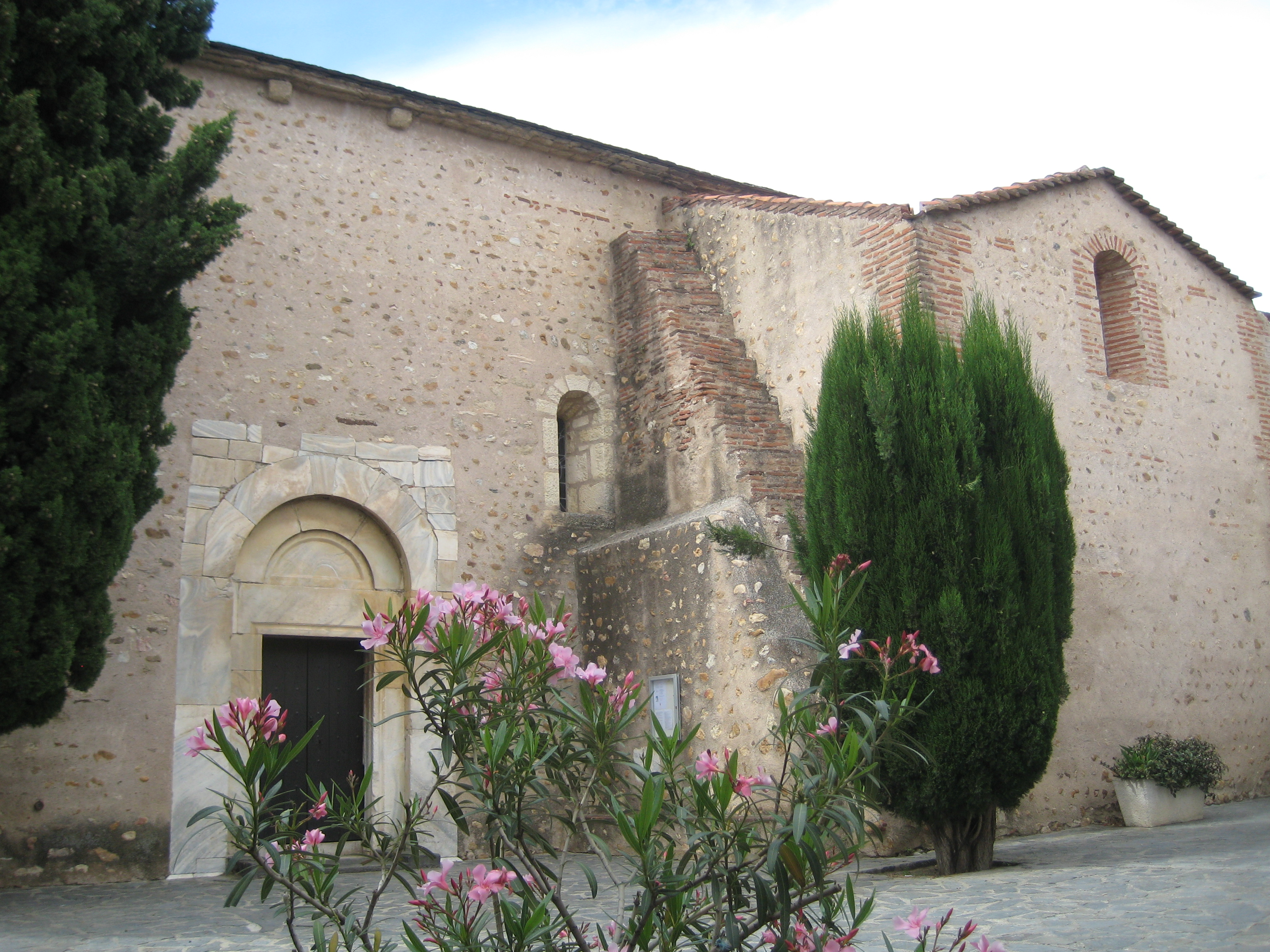 église de Pollestres, XIIe siècle